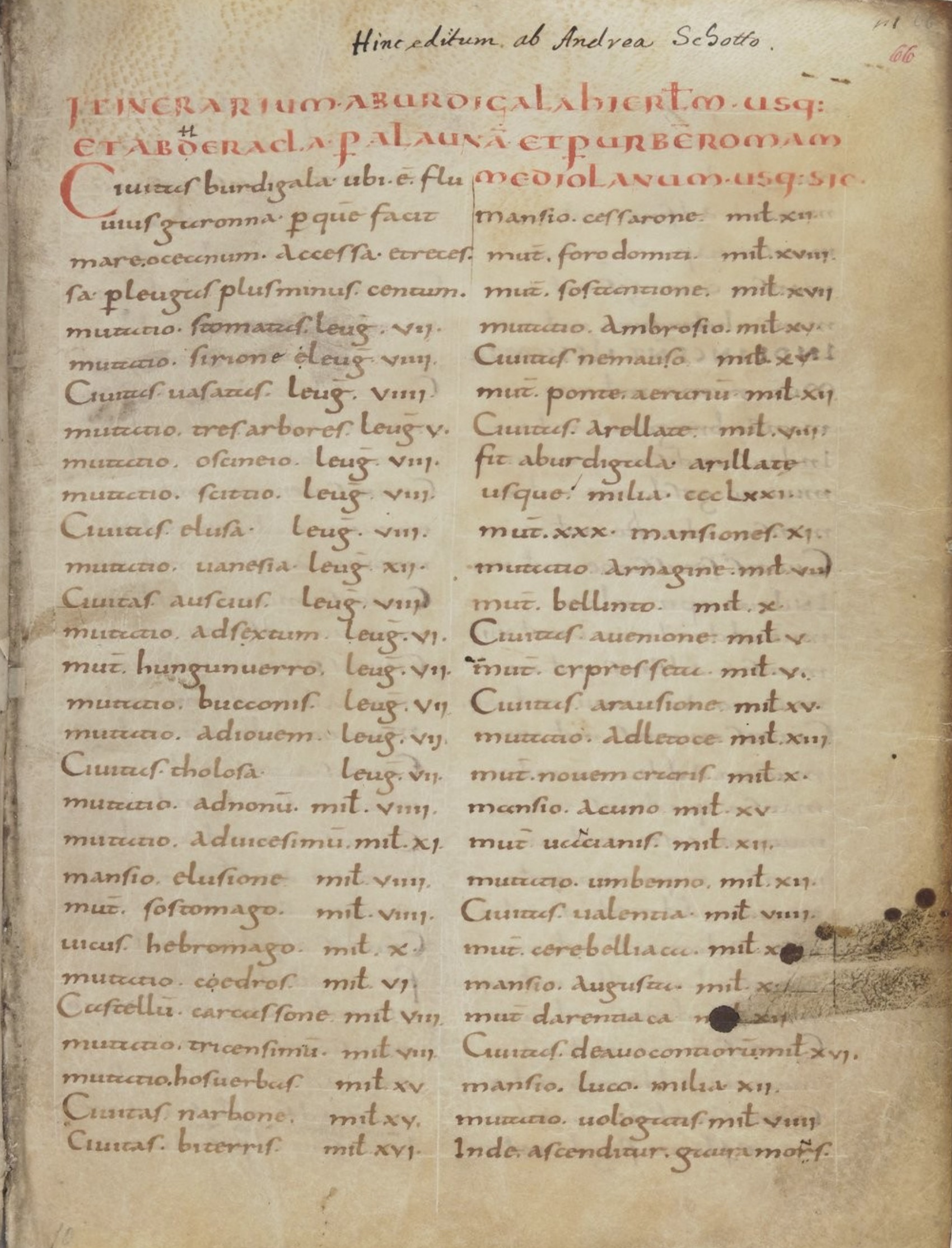 Copie de la première page de l'itinéraire de l'anonyme de Bordeaux, manuscrit conservé à la Bibliothèque Nationale de France